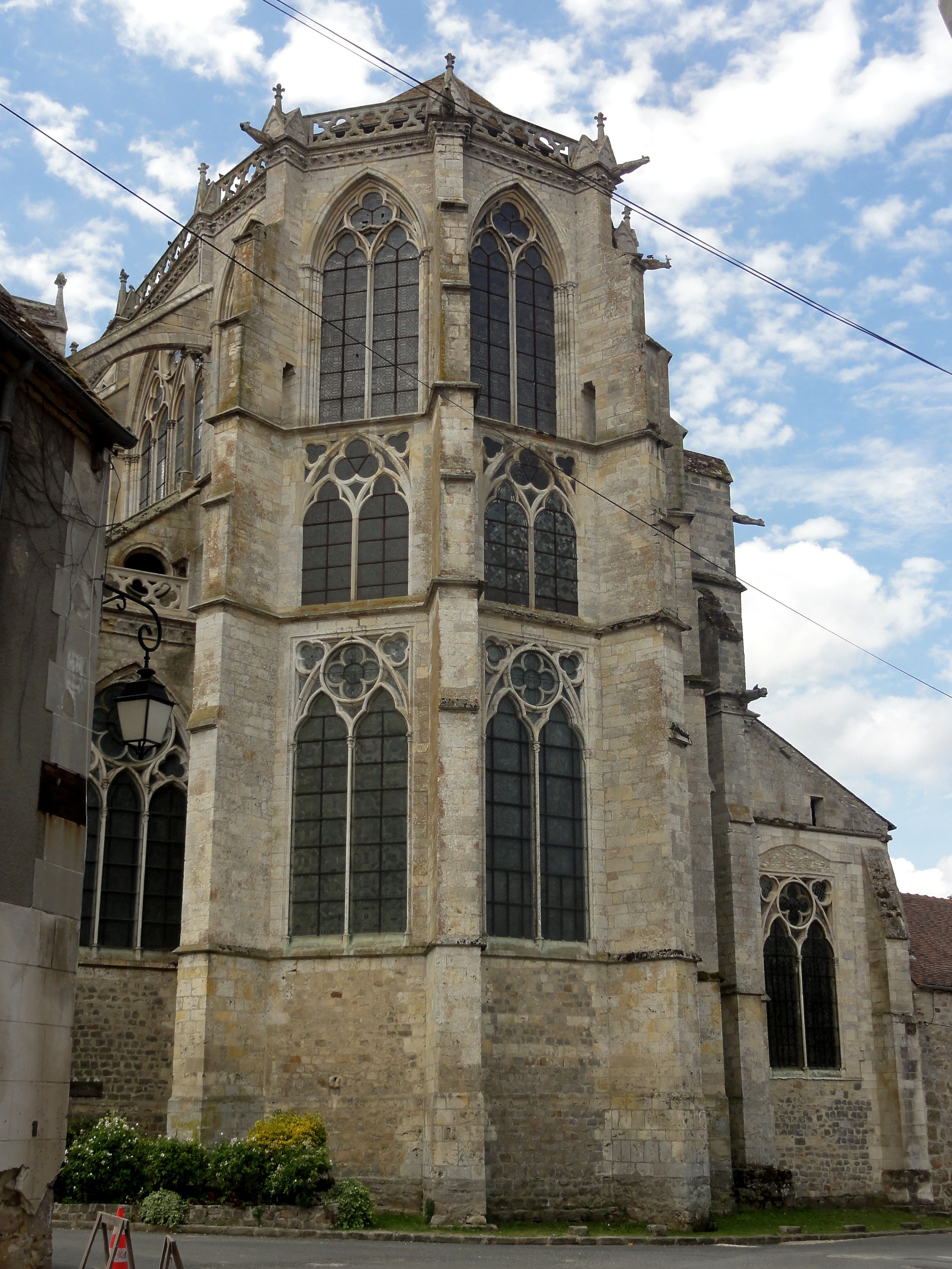 Chevet.